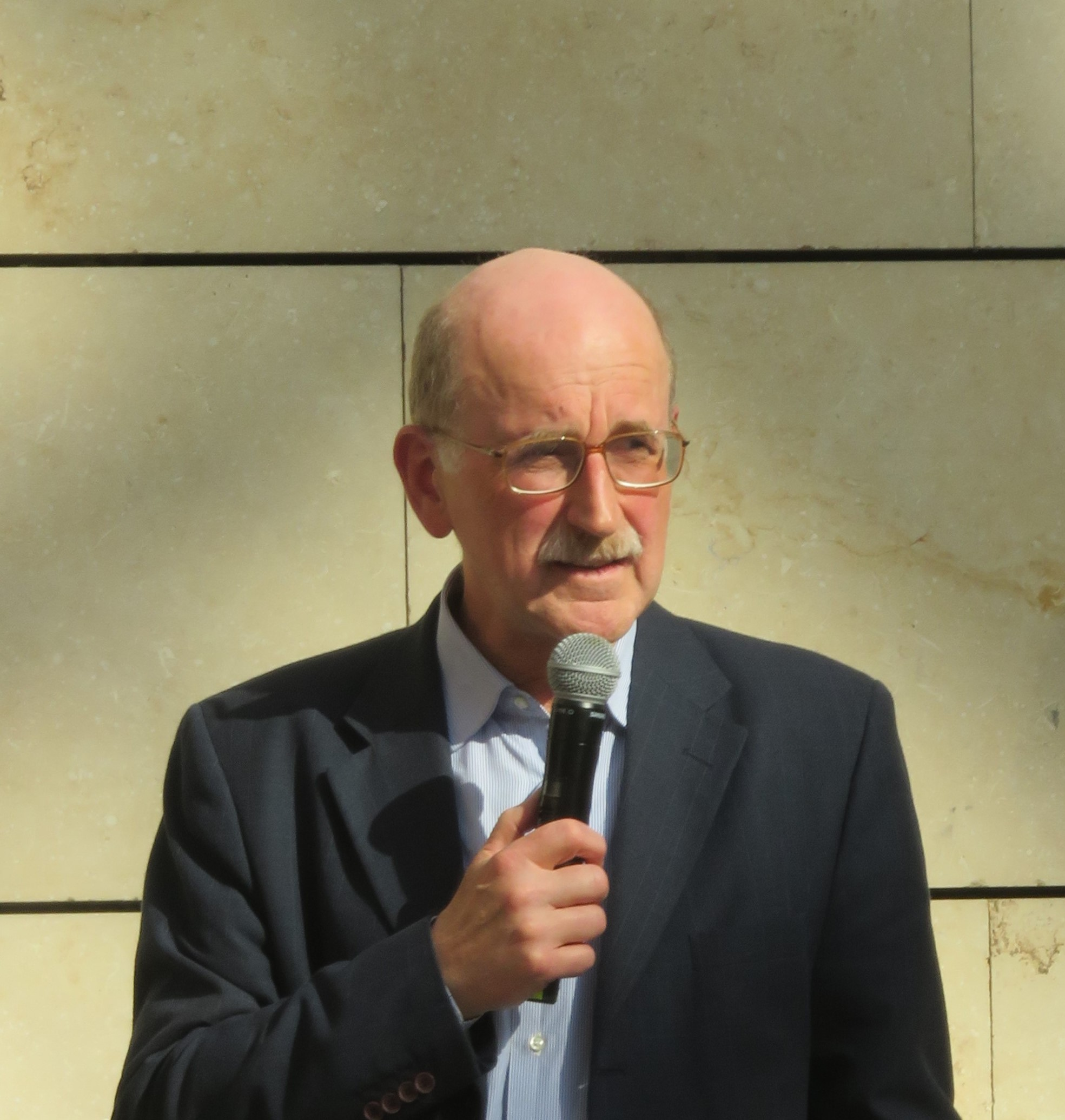 Presentazione il giorno 21 maggio 2018 sotto la cupola del Mart delle iniziative culturali dei tre musei a Rovereto per la tappa del Giro d’Italia del giorno successivo